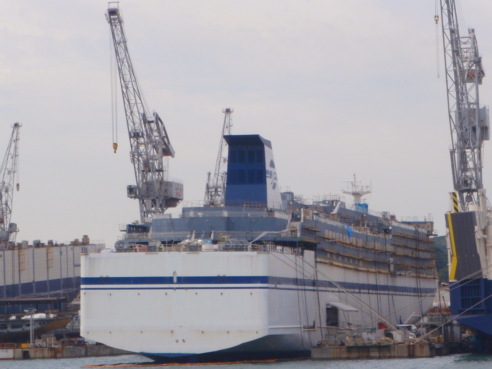 三菱重工業下関造船所で建造中の太平洋フェリー「いしかり」(3代)。（山口県下関市、対岸の巌流島から撮影）